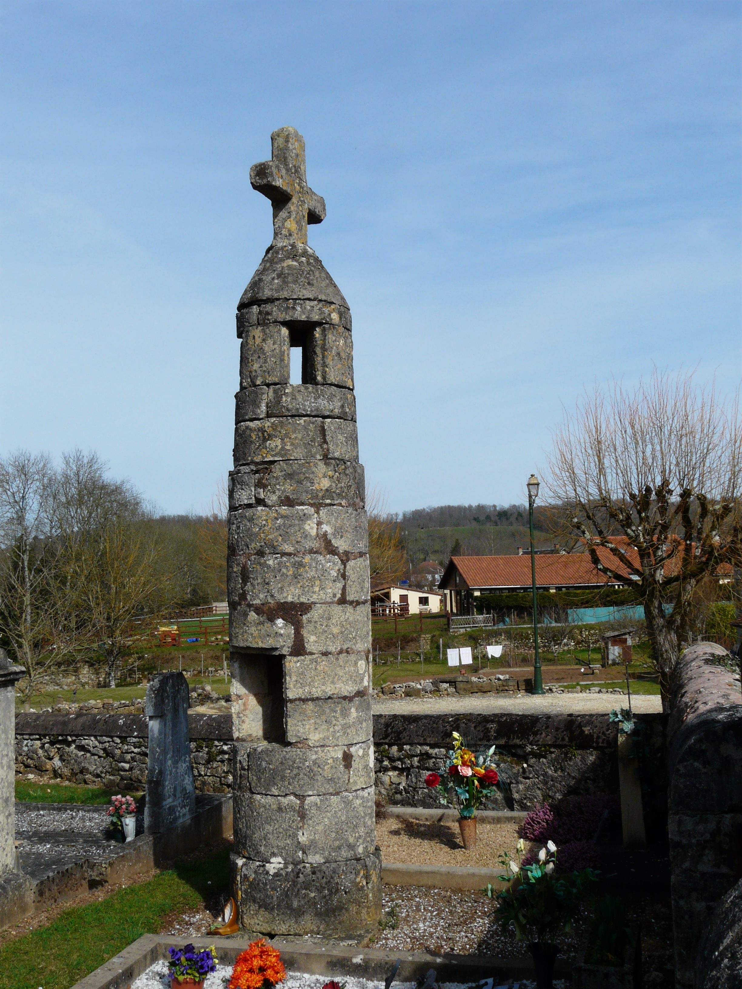 Lanterne des morts, cimetière de Cubas, Cherveix-Cubas, Dordogne, France Object location45° 17′ 45.6″ N, 1° 07′ 34″ E